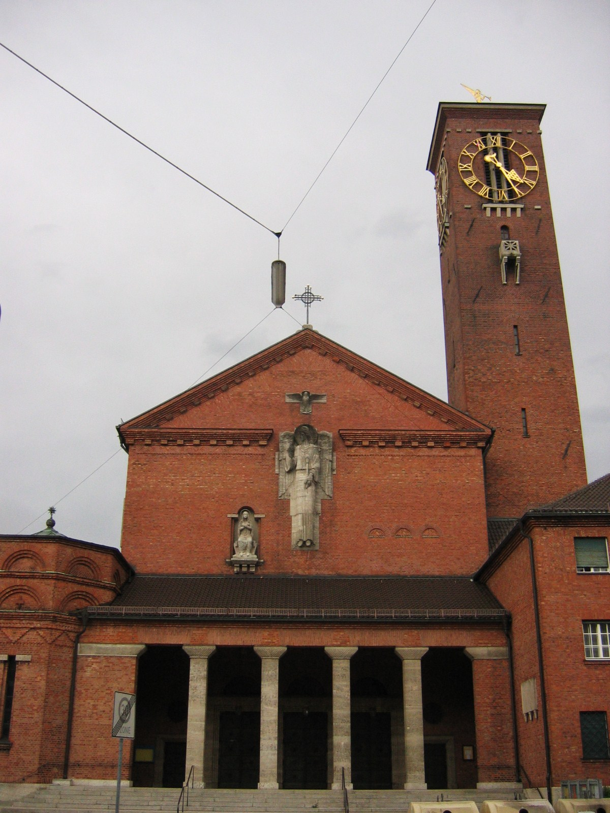 St. Gabriel in München-Haidhausen